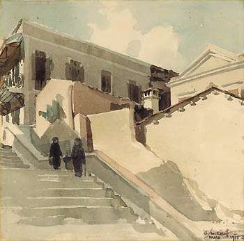 Calçada Central de S. Lázaro